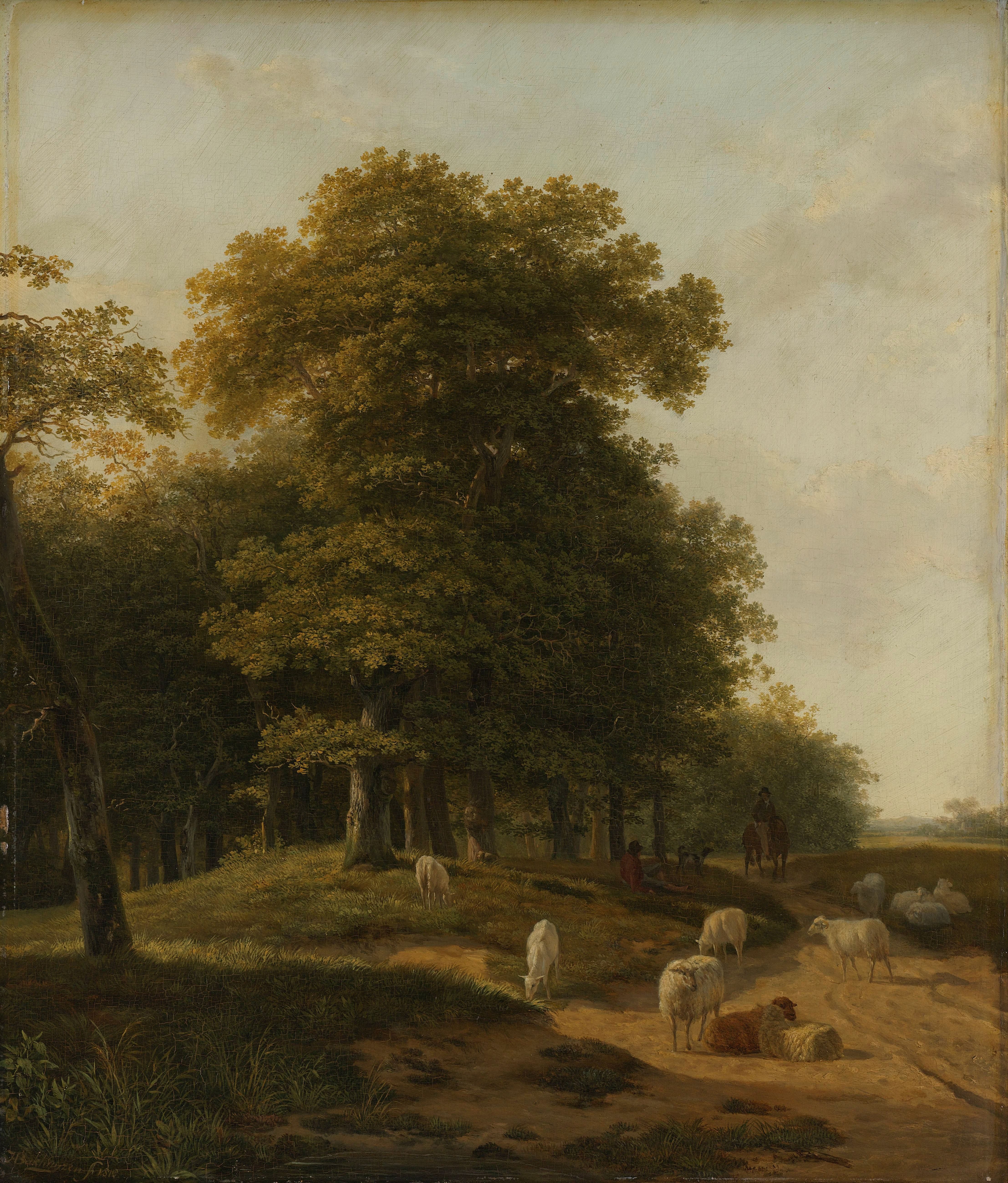 Gelders landschap. Landschap met een zandweg langs de rand van een bos waar een herder zijn schapen hoedt.